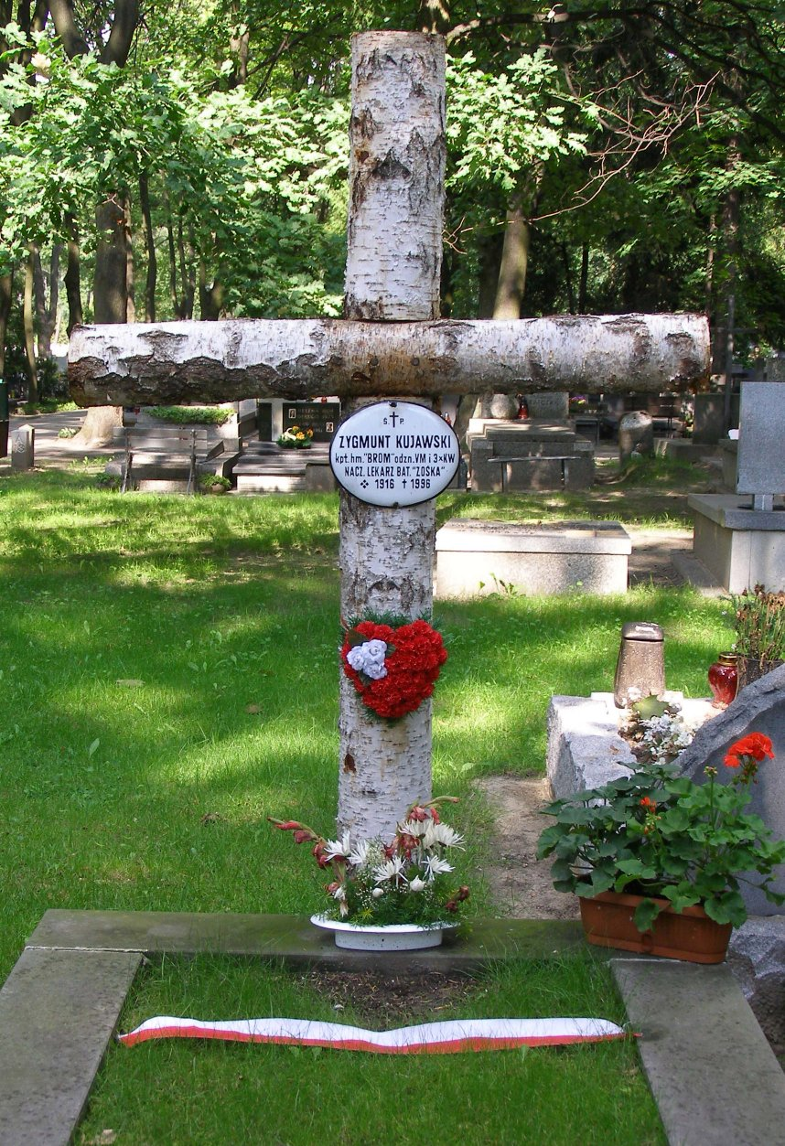 Grób Z. Kujawskiego na Powązkach Wojskowych w Warszawie (fot Zu)